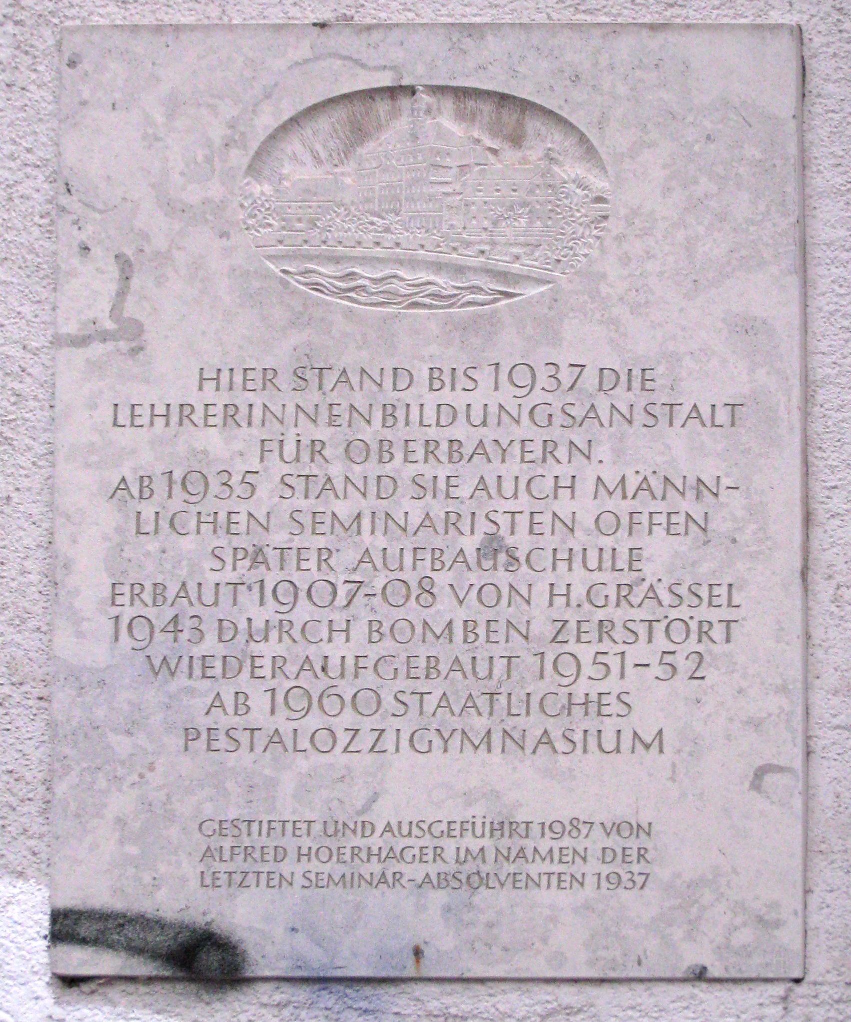 Erinnerungsplatte am Pestalozzi-Gymnasium München